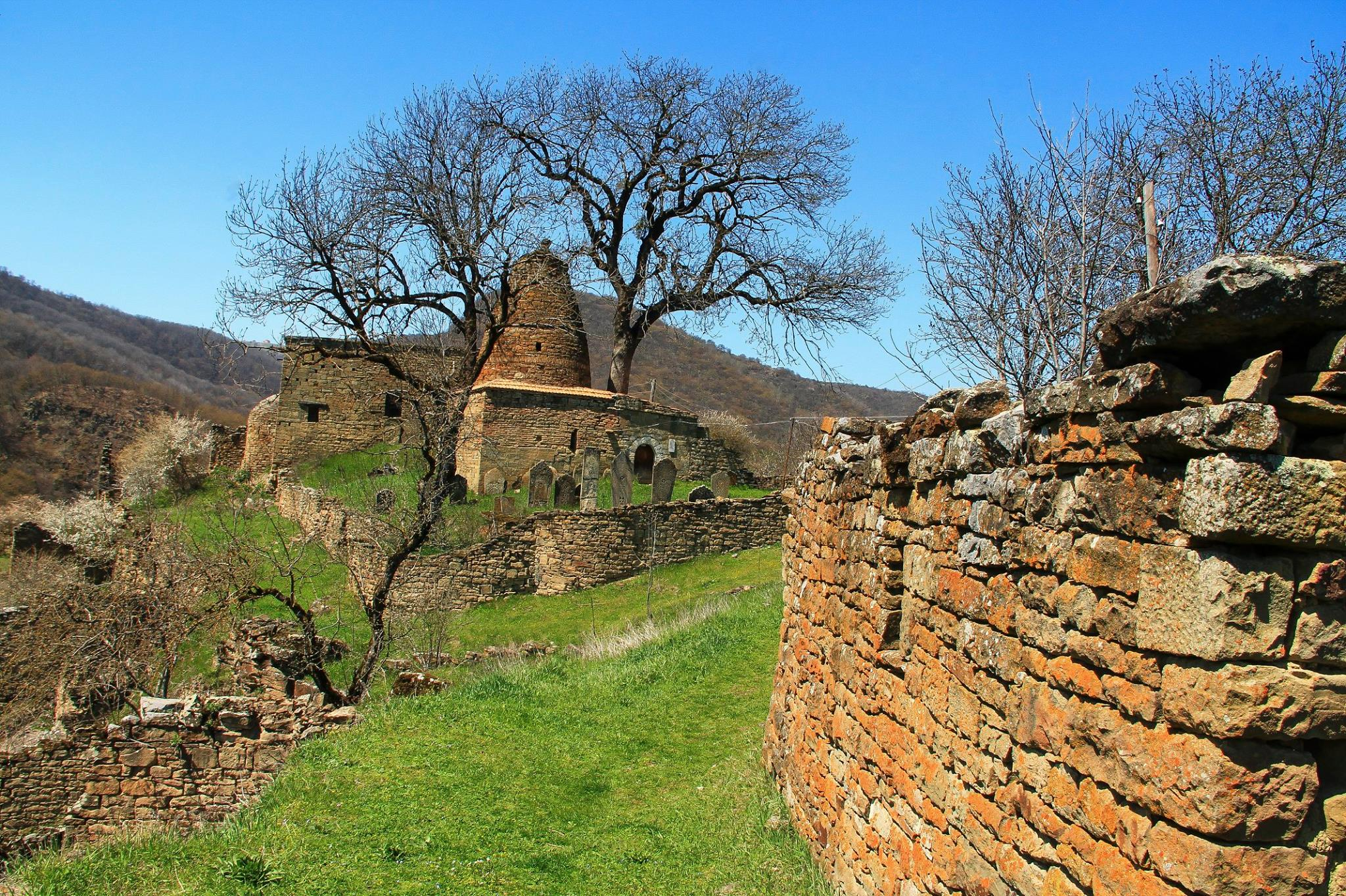 Заброшенный аул Кара-Корейш в Дагестане